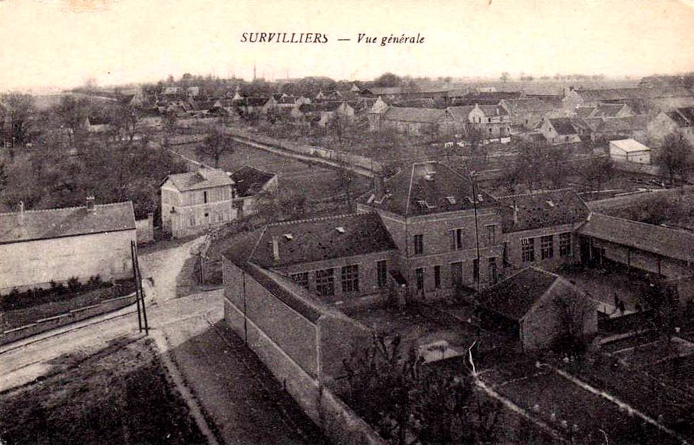 Groupe scolaire de Survilliers inauguré en 1890, avec la mairie au centre. Au fond à gauche la Grande Ferme.z&